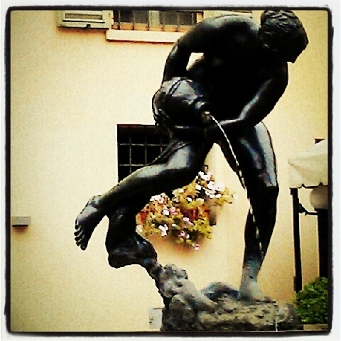 Fontana della ninfa This is a photo of a monument which is part of cultural heritage of Italy.